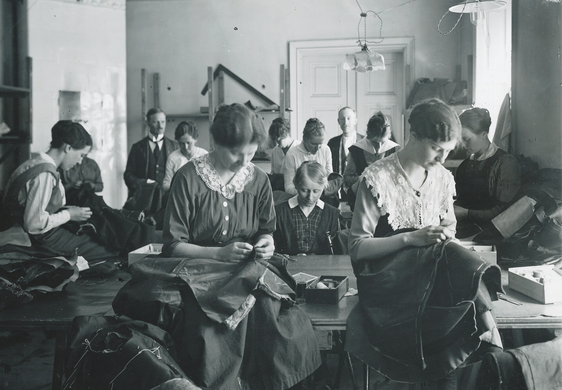 Collins konfektionsfabrik, Lilla Nygatan 12